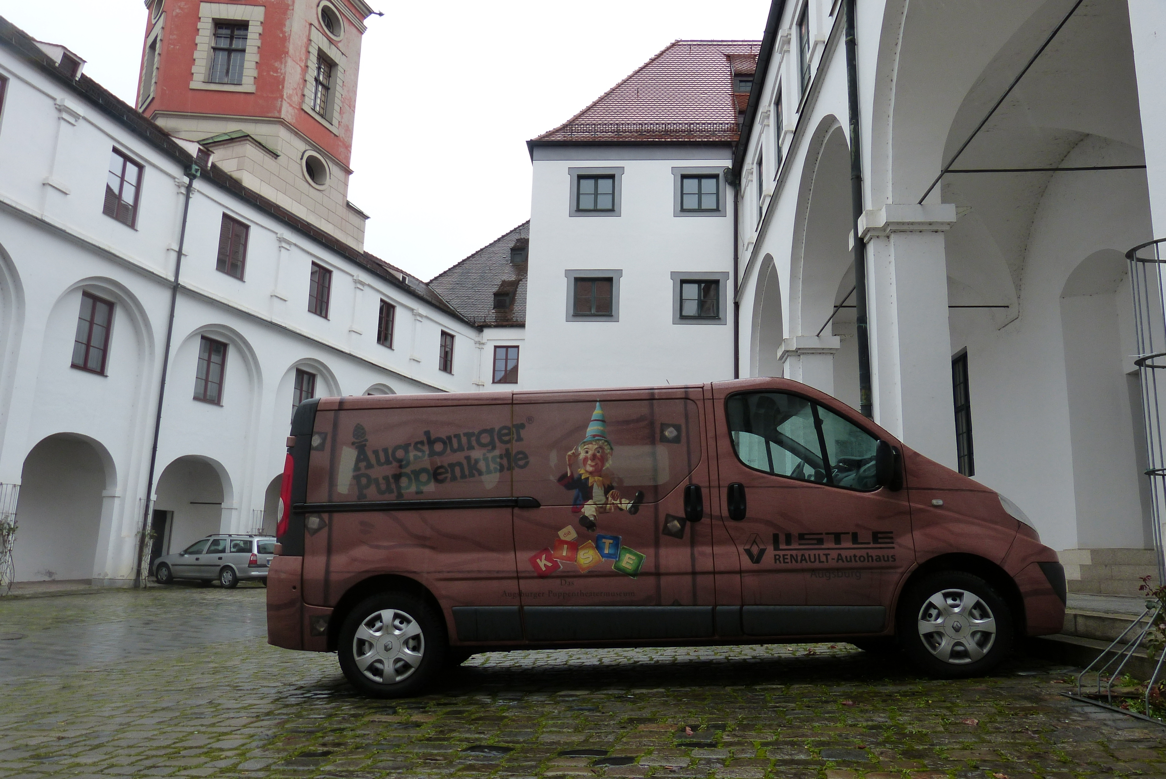 Innenhof des Heilig-Geist-Spitals mit Fahrzeug der Augsburger Puppenkiste. In Hintergrund der Kastenturm. This is the photograph of an architectural monument. It is part of the list of cultural monuments of Bayern, no. D-7-61-000-964